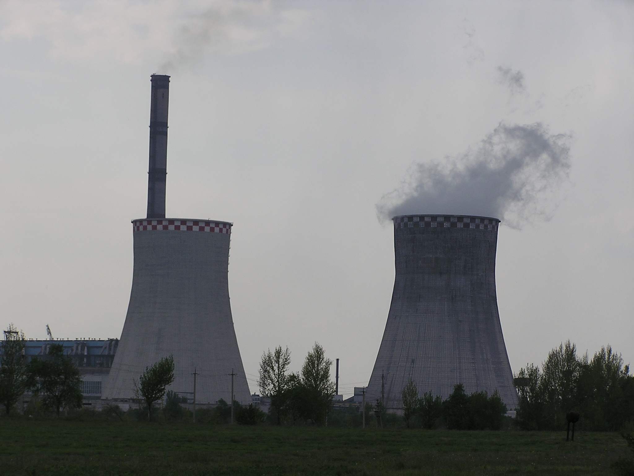 Зугрэс